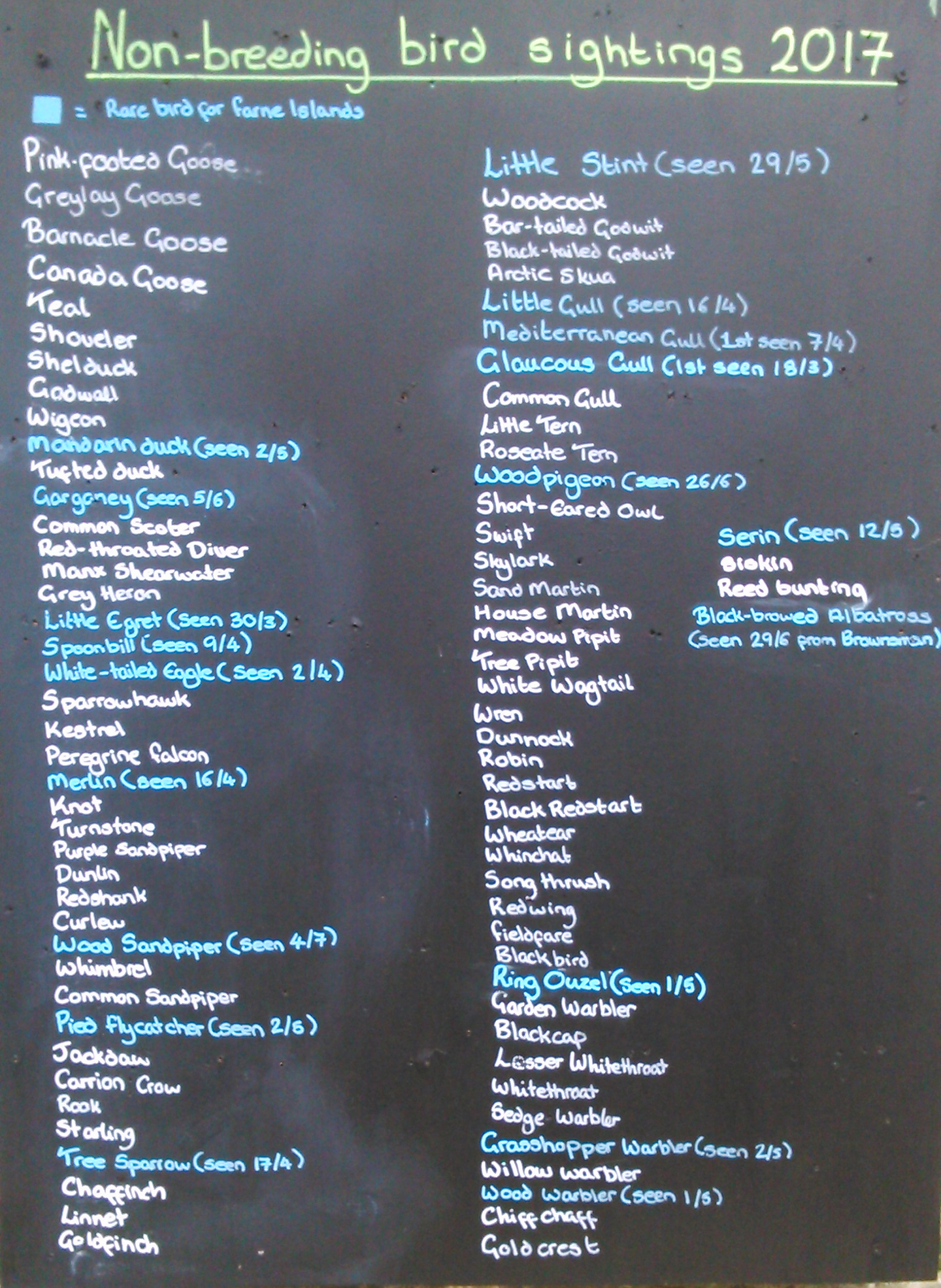 Seltene Vögel auf Farne Island